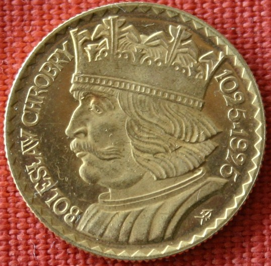 20 Zloty Goldmünze aus dem Jahr 1925 mit dem Konterfei Bolesław I. Chrobry